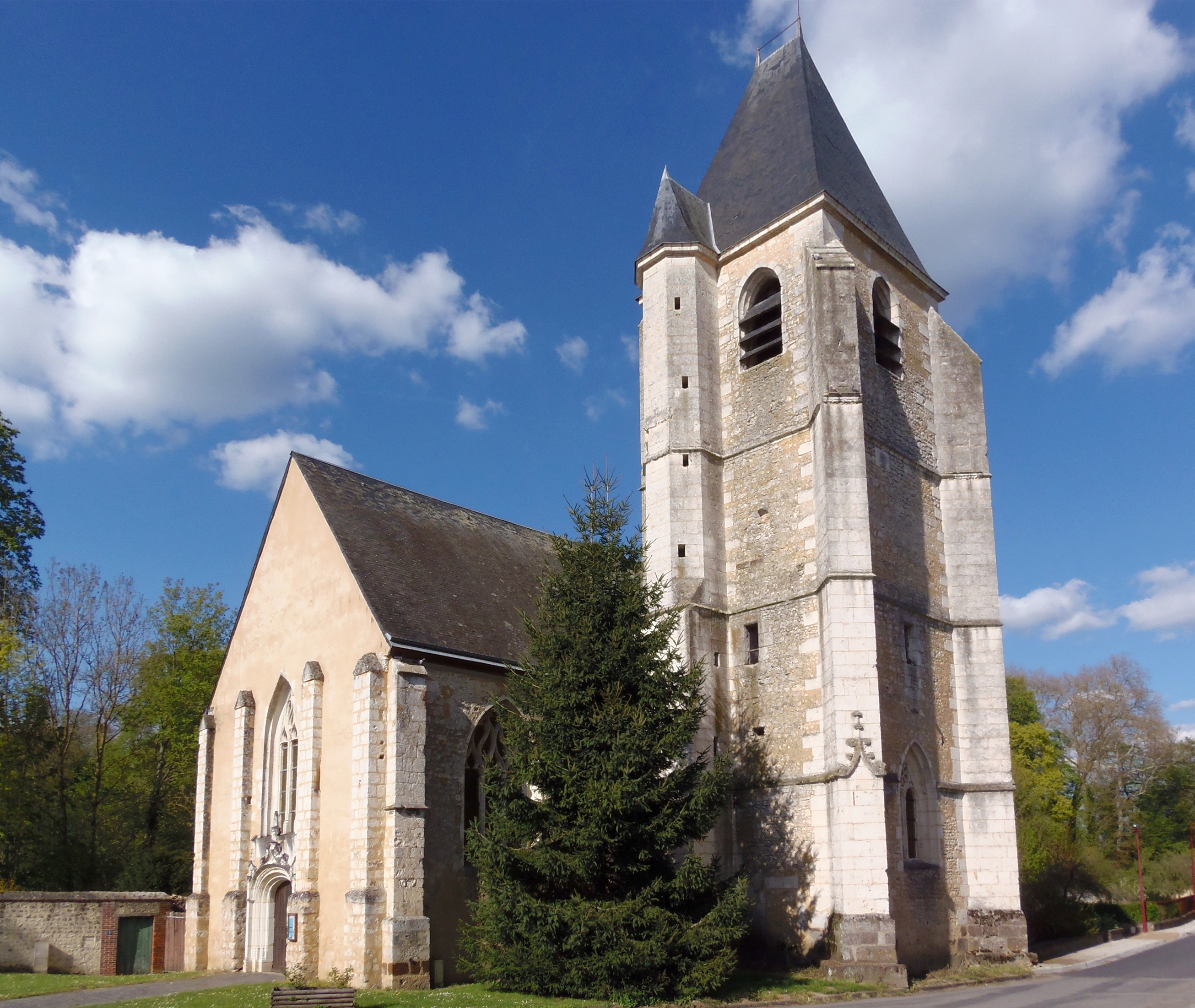 Condeau (Normandie, France). L'église Saint-Denis.